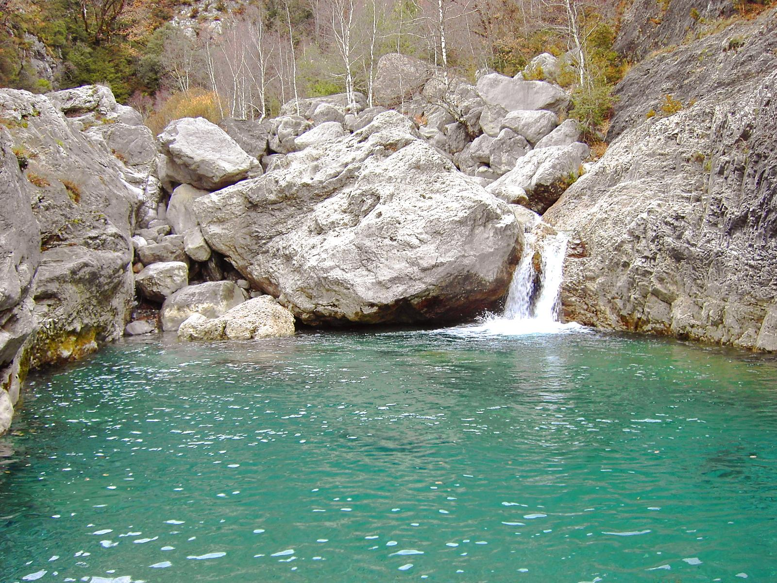 Una poza o balsa del río Yaga en el paso de La Capaniacha, en el valle de Tella.